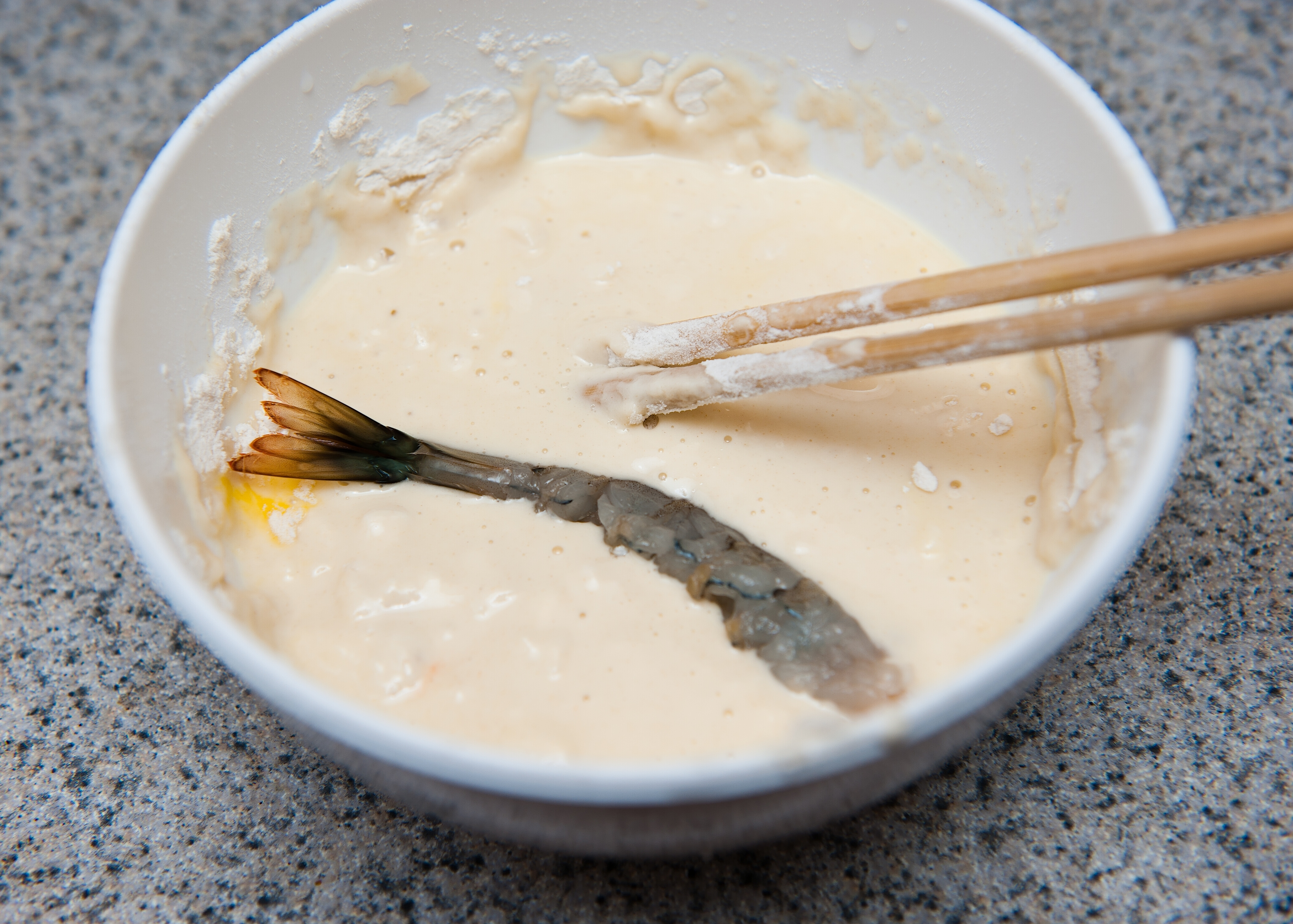 Ummantelung einer einzelnen Tempura-Zutat (hier Garnele) mit Tempura-Teig. (Hinweis: Dies erfolgt in der Regel jeweils unmittelbar vorm Frittieren der Tempura-Portionsstücke.)